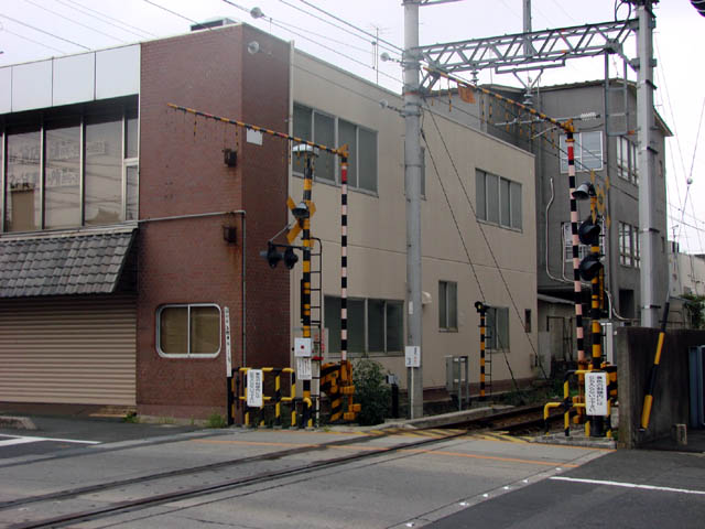 屈折形遮断桿